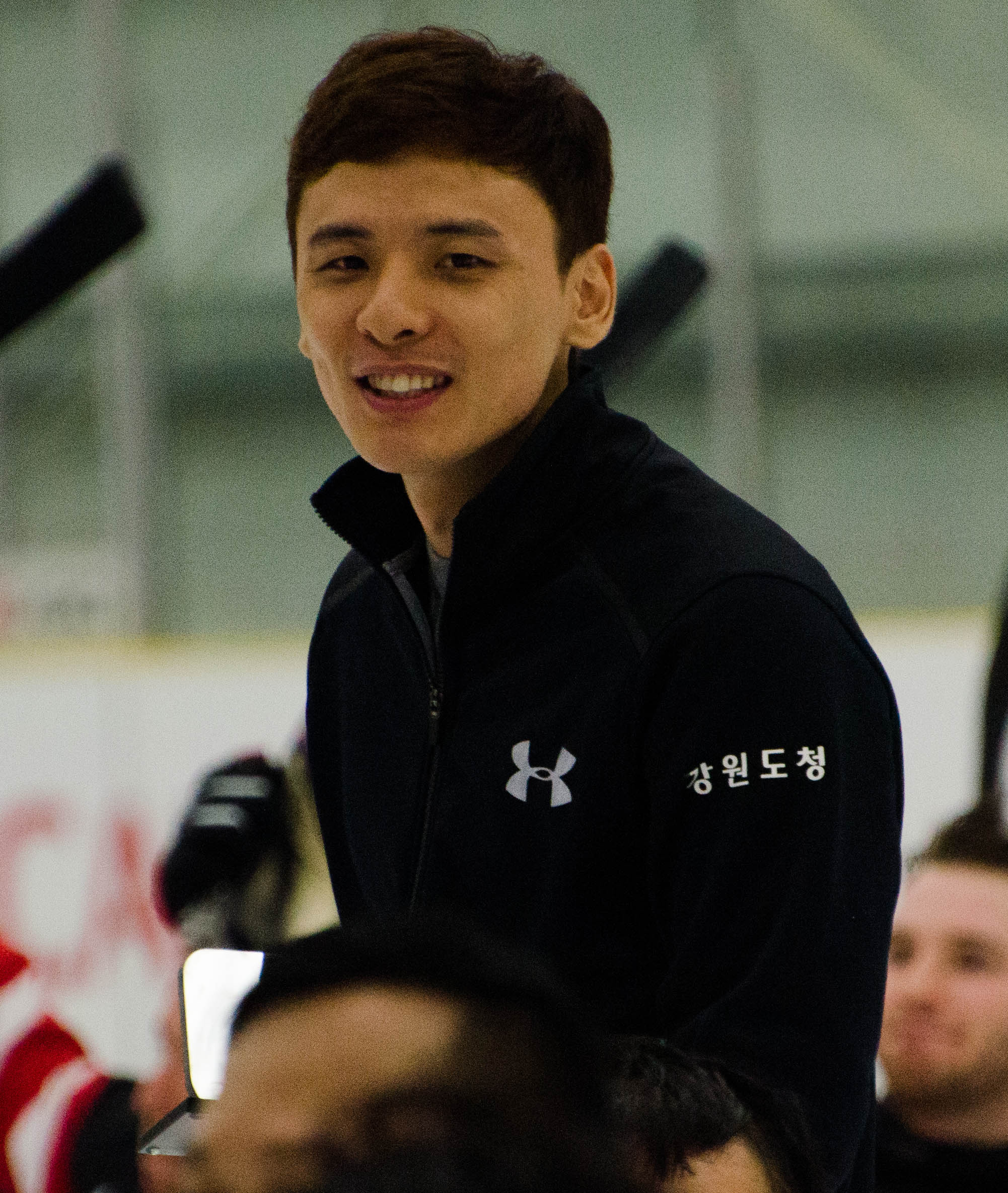 Jung Sung Hwan, 2015